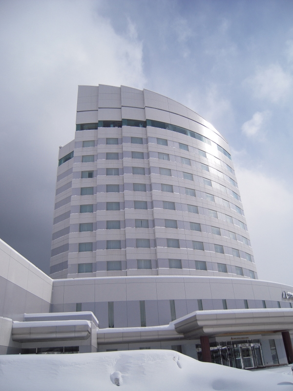 稚内全日空ホテル